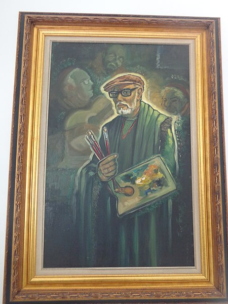 Autorretrato de Willy Zumblick, 1970. Óleo sobre tela, 0,90m x 1,40m. Exposto no Museu Willy Zumblick, Tubarão, Santa Catarina.